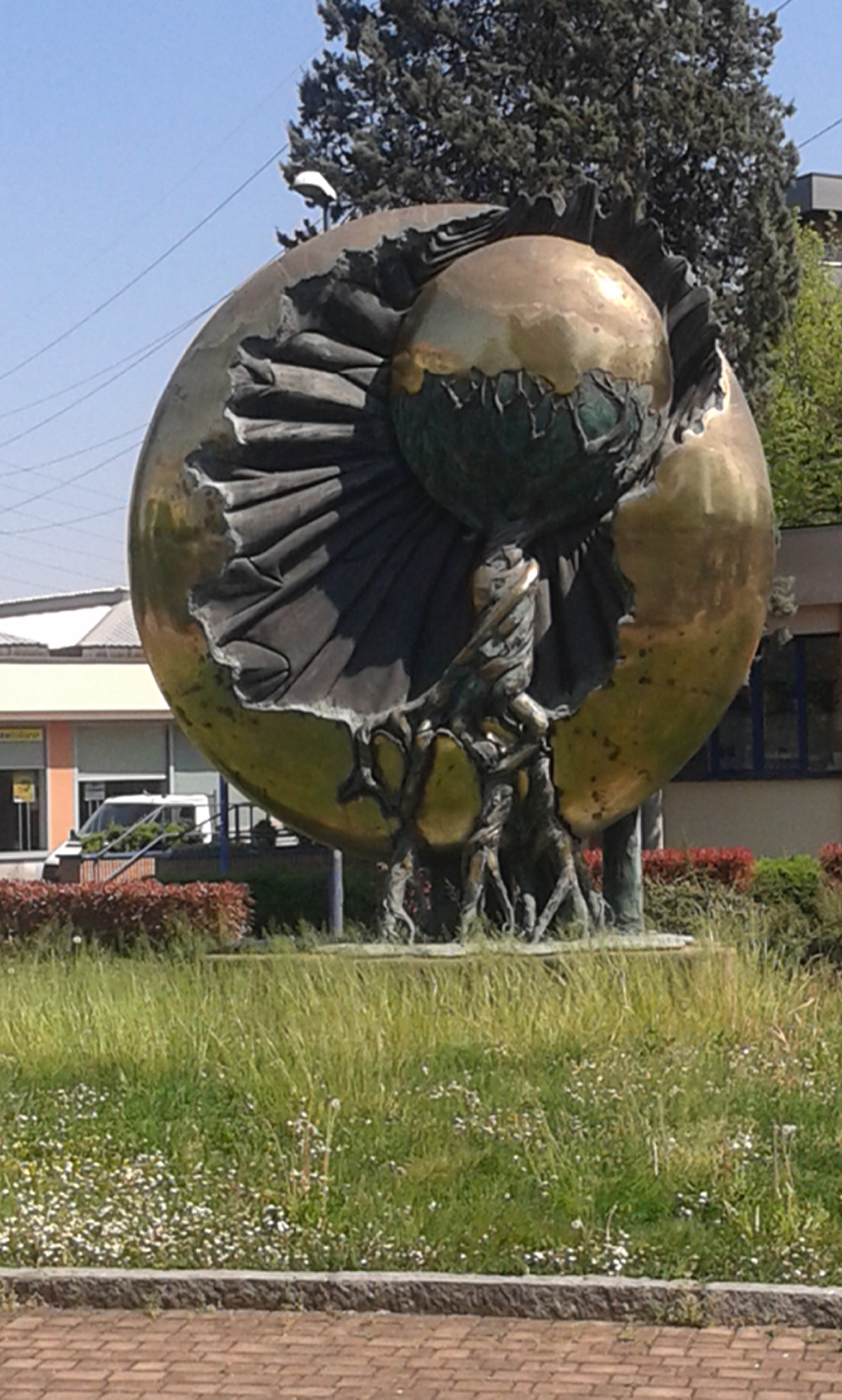 Monumento alla Pace - piazza Giovanni XXIII - Brugherio - vista posteriore